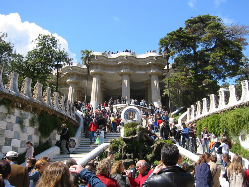 Escalinata principal del Parc Güell